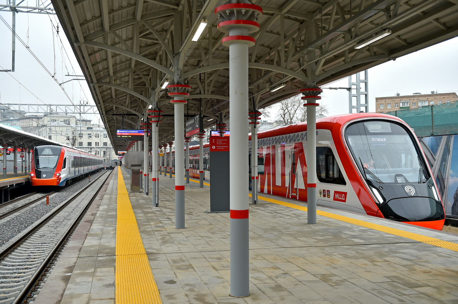 Электропоезда ЭГ2Тв-029 и 0?? на Белорусском вокзале в Москве